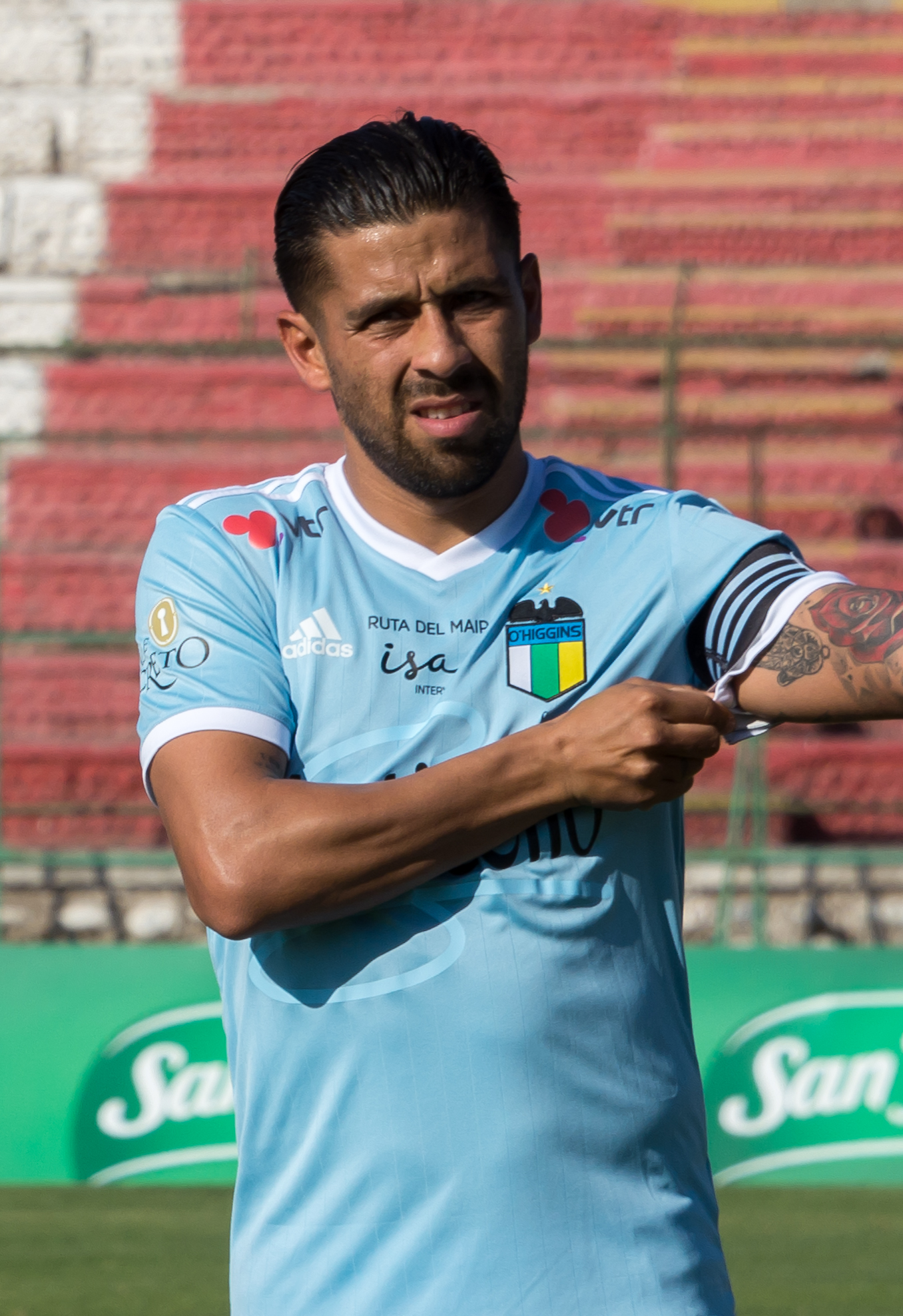 Ramón Ignacio Fernández, Palestino v O'Higgins, Estadio Municipal de La Cisterna, La Cisterna, Santiago, Chile.